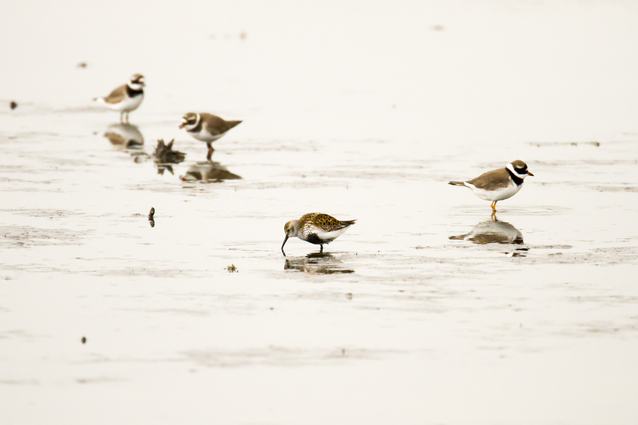 Gravelots et becasseau variable en plein repas,marais d'orx